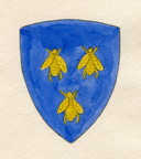 Stemma della famiglia Barberini